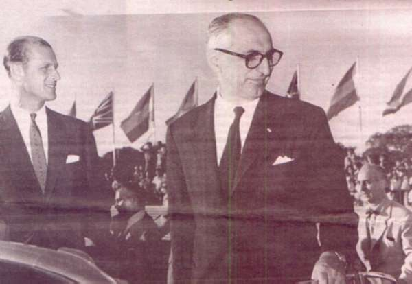 Es una foto del príncipe Felipe de Mountbatten, de Gran Bretaña, con el presidente de Argentina, Arturo Frondizi, en 1962.